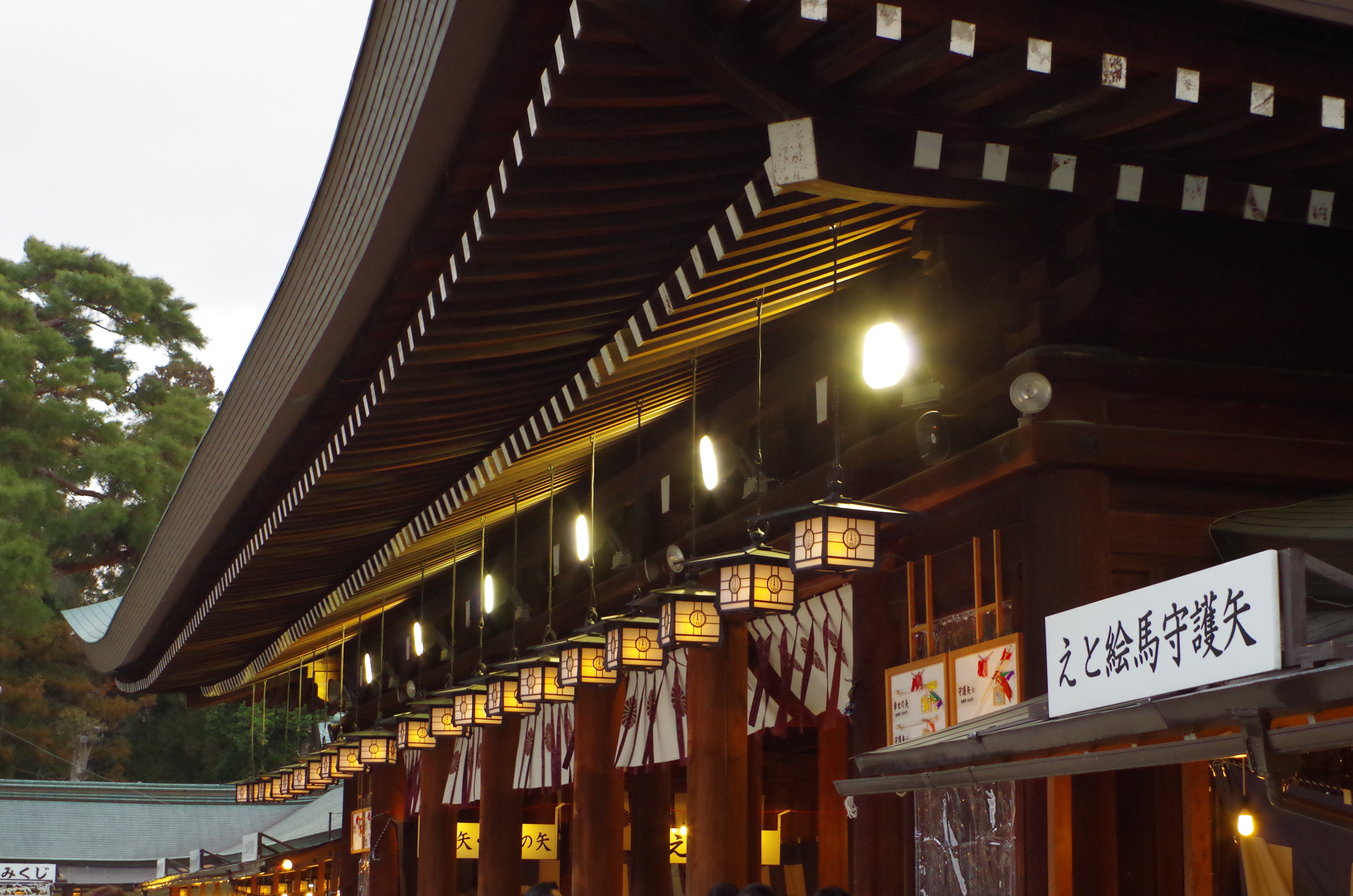 橿原神宮にて Kashihara-jingū 2013.1.02